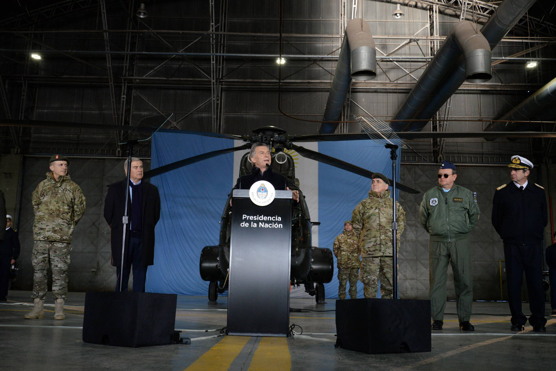 El presidente de Argentina, Mauricio Macri, anunció un "plan de modernización" de las Fuerzas Armadas que les daría potestad para realizar tareas que puedan "colaborar" con la seguridad interior del país. Macri formuló estos conceptos al encabezar, junto al ministro de Defensa, Oscar Aguad, el acto de presentación en el Hangar de Aviación del Ejército, en el área militar de Campo de Mayo ubicada en el partido bonaerense de San Miguel. También asistieron los jefes del Estado Mayor Conjunto de las Fuerzas Armadas, teniente general Bari del Valle Sosa (VGM); del Ejército, general de brigada Claudio Pasqualini, de la Fuerza Aérea, brigadier general Enrique Amrein, y de la Armada, vicealmirante José Luis Villán.